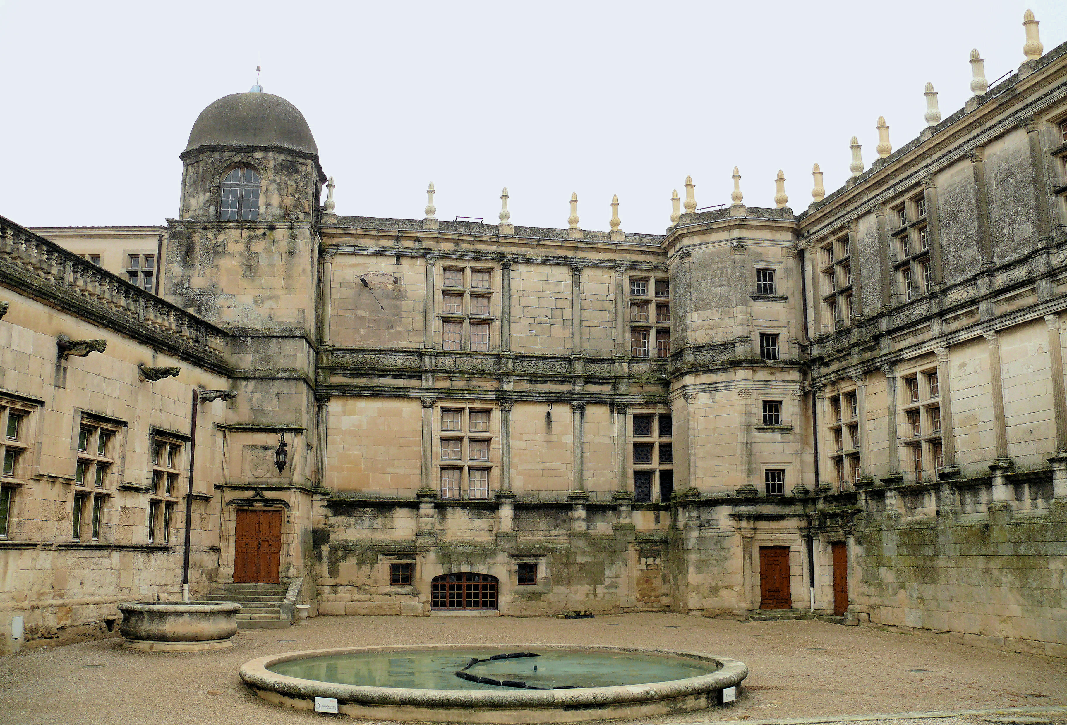 Château de Grignan - Cour du puits